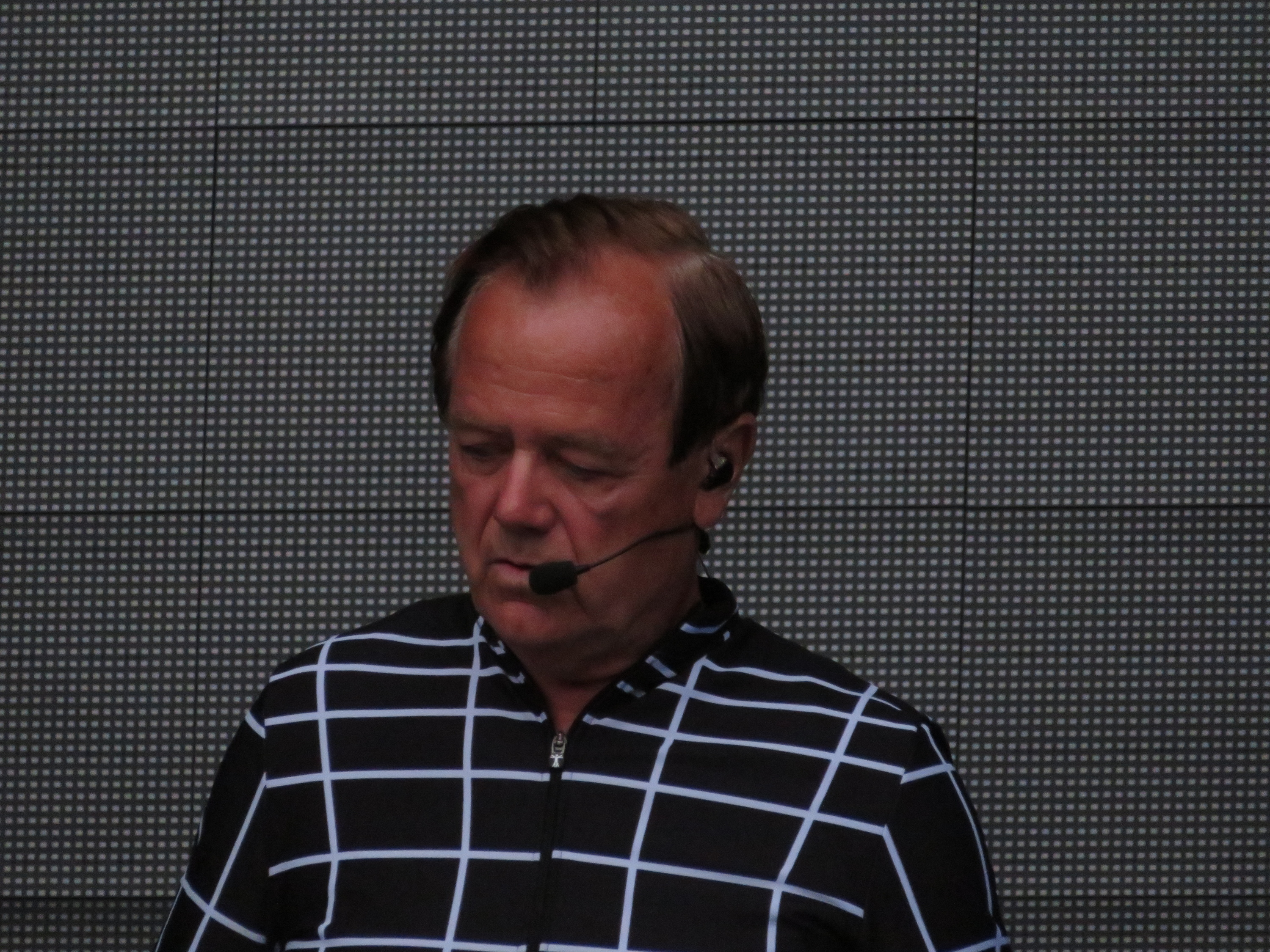 Kraftwerk, 2018-07-20, jazzopen 2018, Schlossplatz Stuttgart